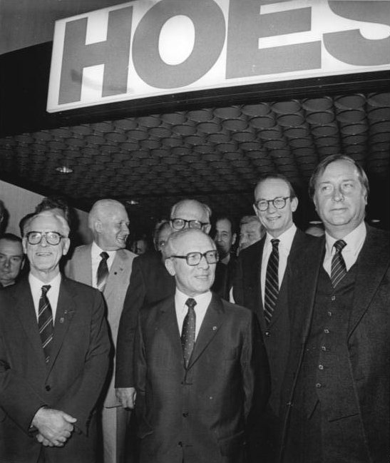 ADN-ZB Mittelstädt-10.3.85-eng Leipzig: Frühjahrsmesse 85-Am Stand des Hoesch-Konzerns trafen Erich Honecker und weitere Mitglieder der Partei- und Staatsführung der DDR mit Dr. Detlev Rohwedder (r), Vorstandsvorsitzender der Hoesch-AG, Dr. Hans Otto Bräutigam (2.v.r.), Leiter der Ständigen Vertretung der BRD in der DDR, und weiteren Persönlichkeiten zusammen.